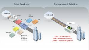 Монгол: Нэг цэгт бүх үйл ажилгааг нэгтгэсэн байдлыг харуулж байна